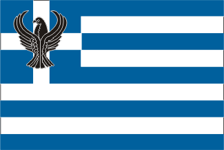 Bandera proposada per l'Estat del Pont 1919